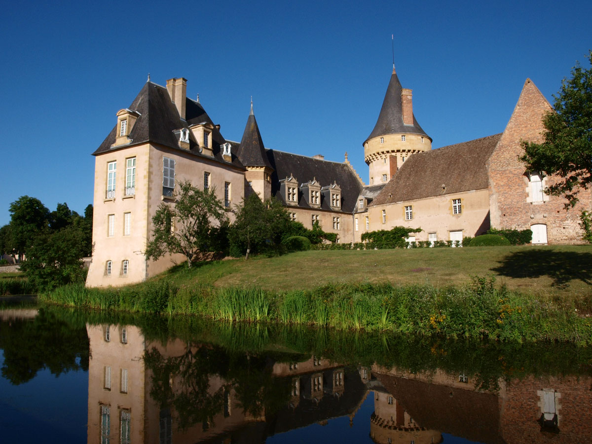 Château de Saligny situé à Saligny-sur-Roudon, dans le département de l'Allier (03)